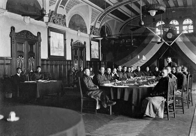 民国八年南北议和会议，上海，1919年2月20日。1917年孙中山在广州发动护法运动，南北战起。1919年2月，南北双方在上海举行议和会议。站立者为北方总代表朱启钤。会议桌左侧为南方代表。从左至右：王伯群、郭椿森、缪嘉寿、章士钊、唐绍仪（南方总代表）、胡汉民、曾彦、刘光烈、彭允彝、李述膺、钟文耀。门前方桌后右为贾士毅，左为周诒春。